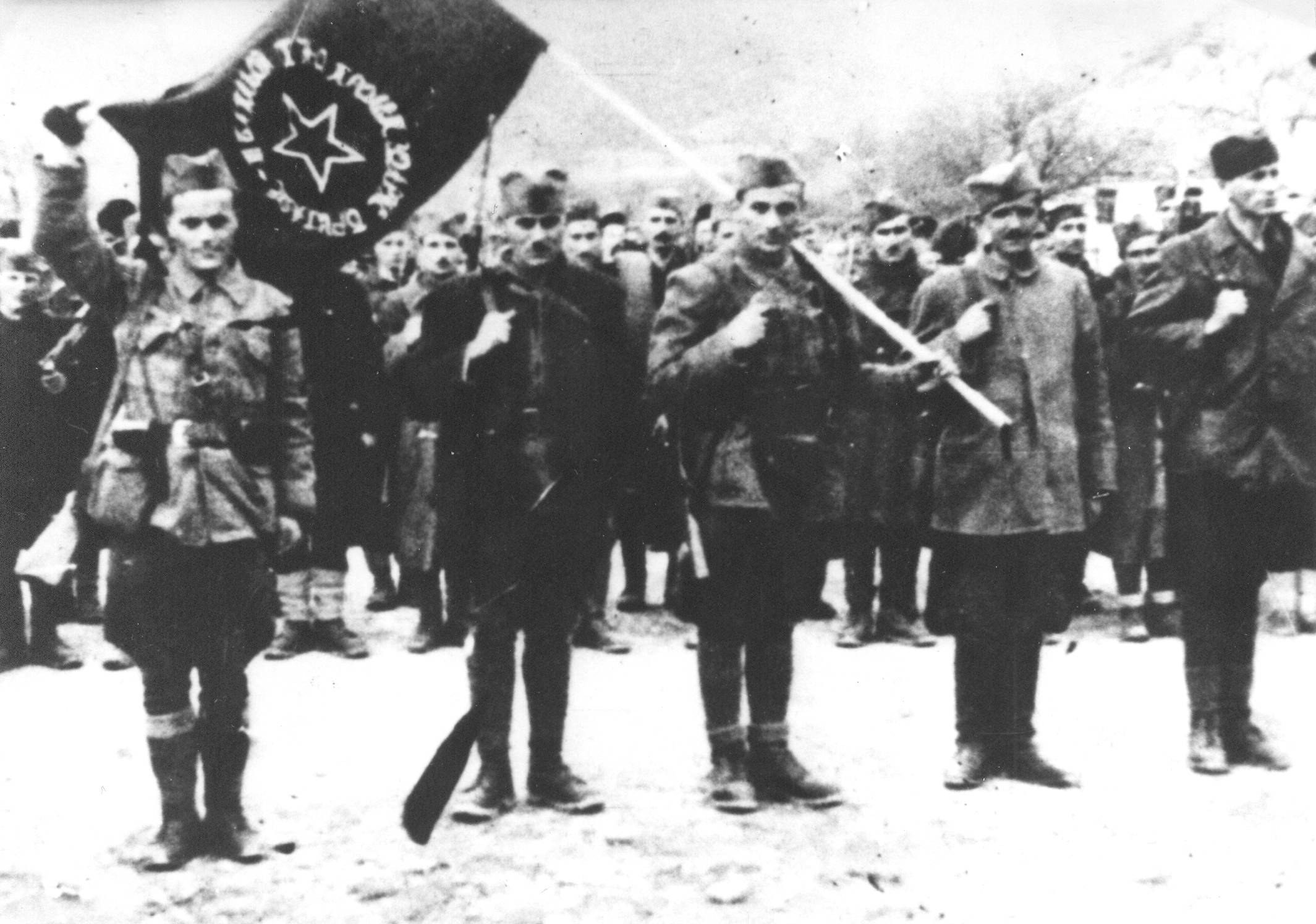 Srpskohrvatski / српскохрватски: 3. bataljon 1. proleterske brigade za vreme primanja zastave u Foči 5. marta 1942.